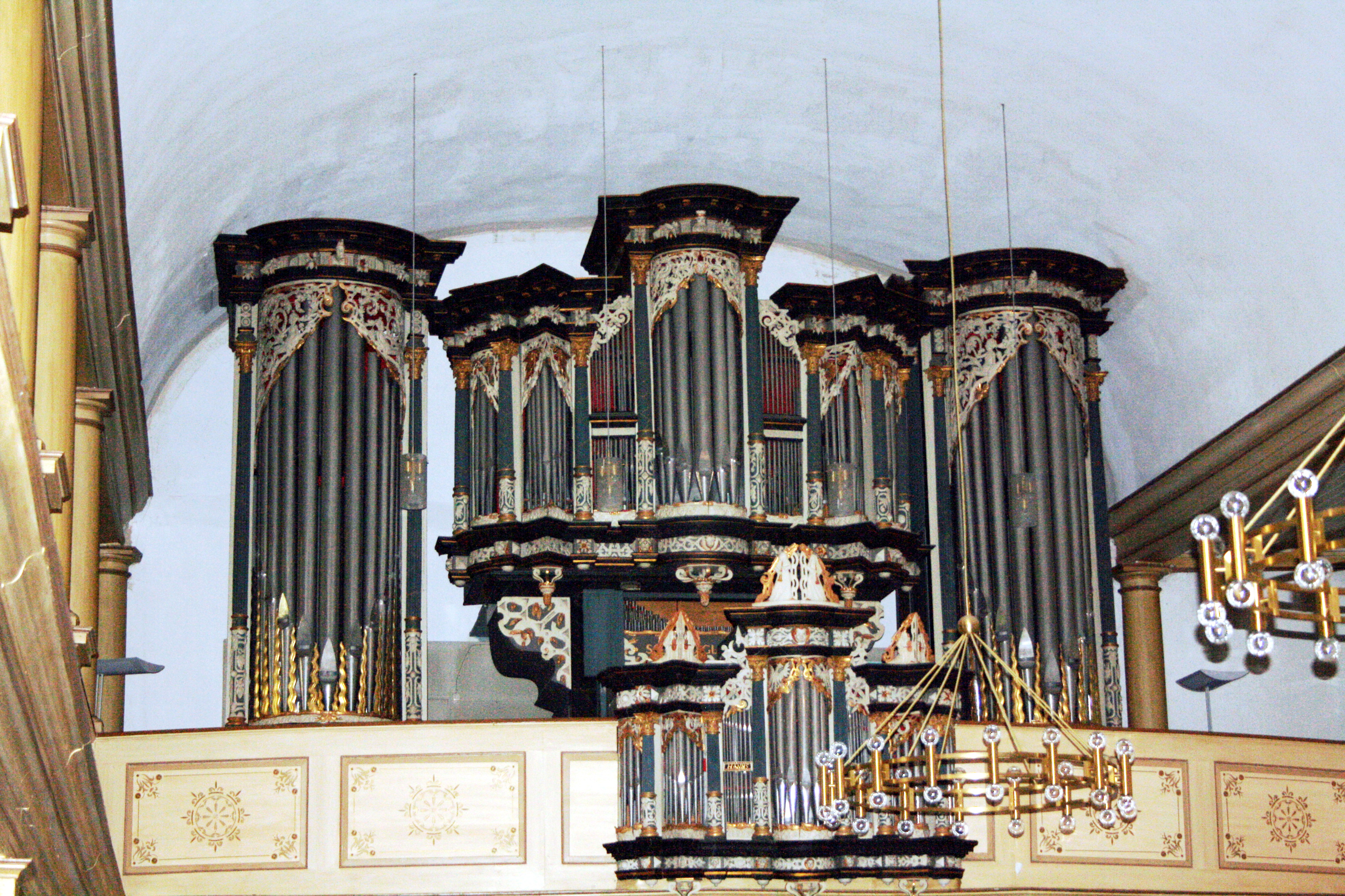 Orgel in St. Pankratius, Burgdorf, Region Hannover, Niedersachsen